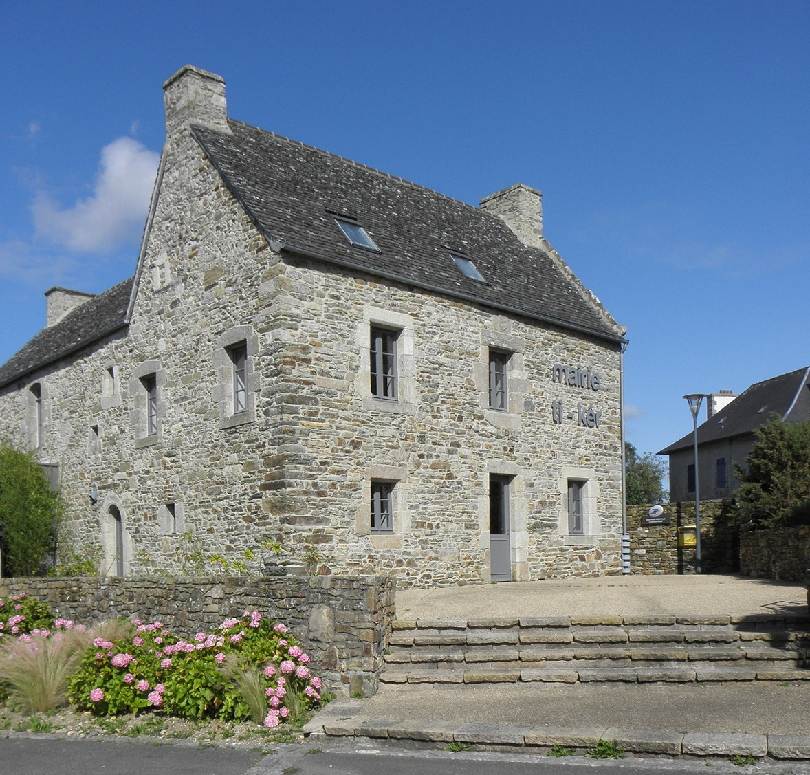 Mairie de Guimaëc (29).